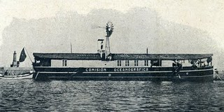 Cañonero Cocodrilo transformado en buque oceanográfico 1908